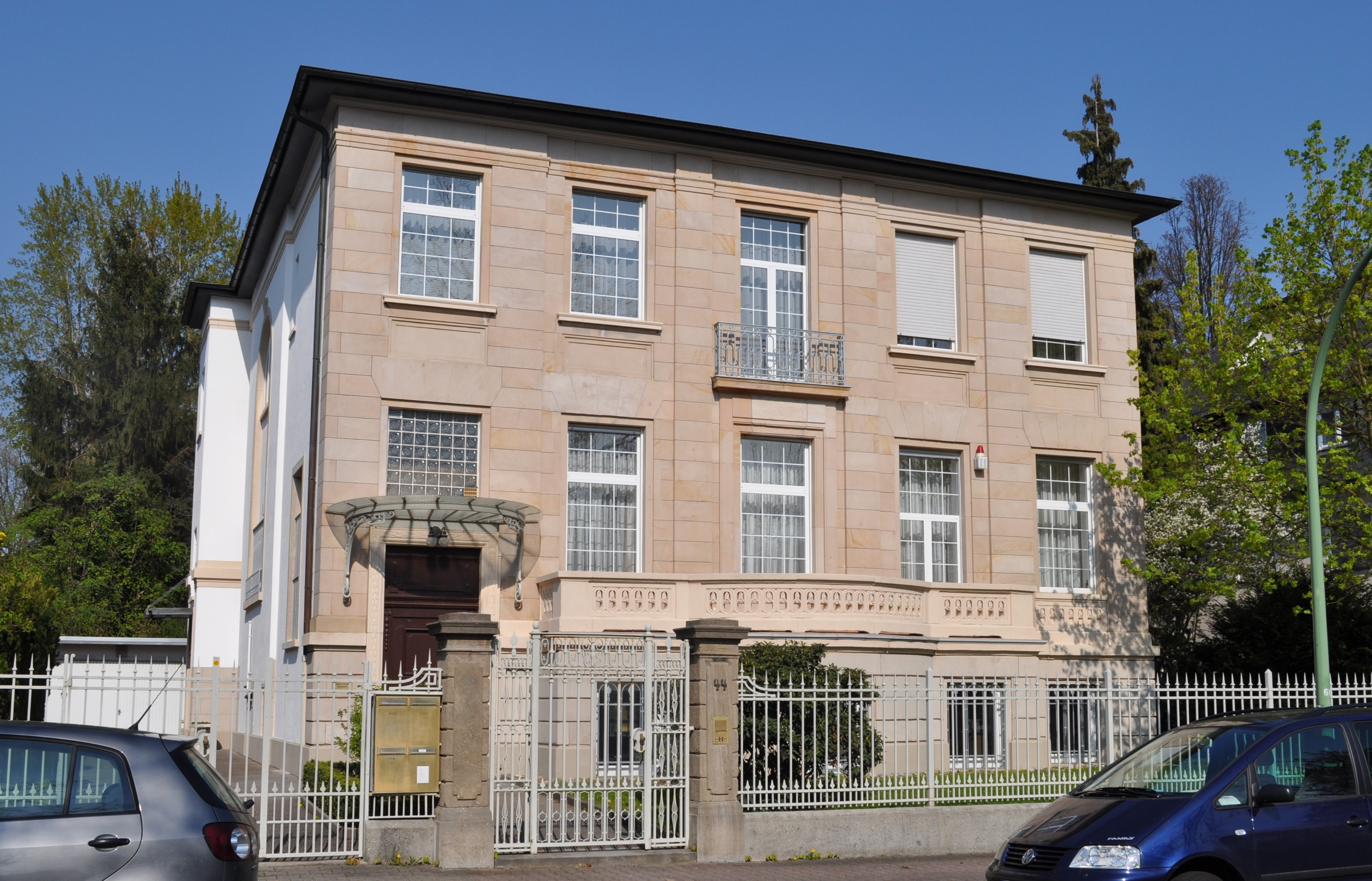 Zeppelinallee 44 in Frankfurt am Main Bockenheim